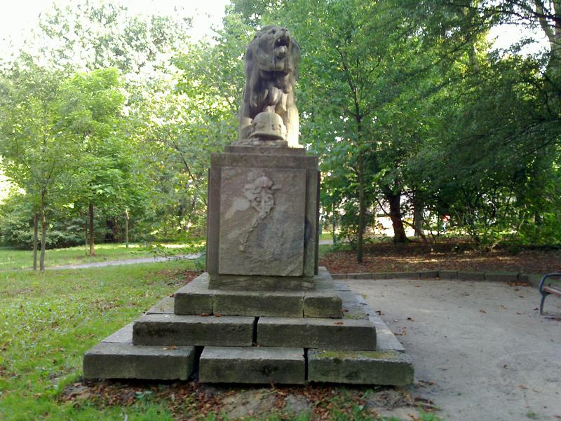 Denkmal für Gefallene des Ersten Weltkrieges in Torgau, geschaffen von Hans Dammann